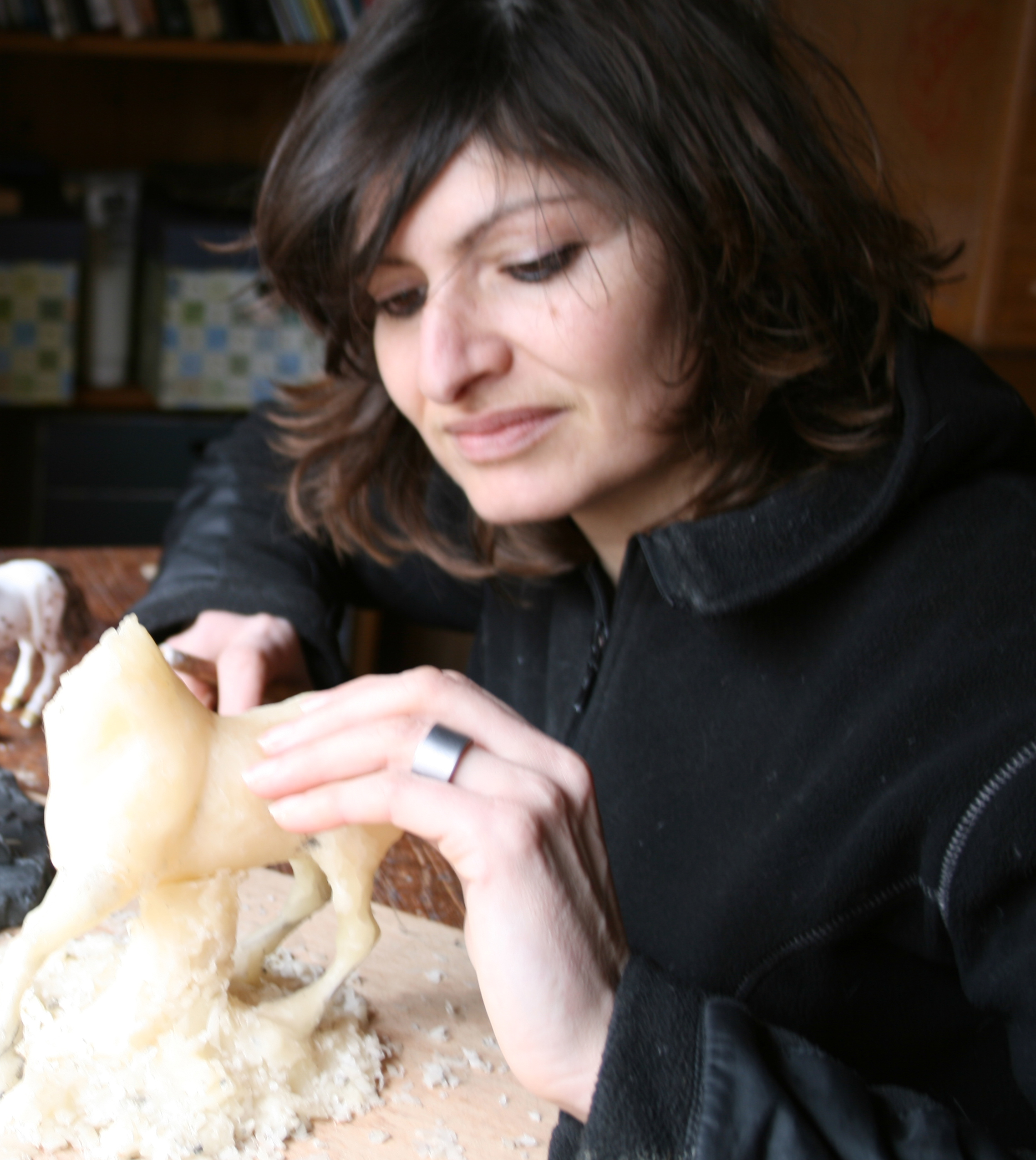 Marine Oussedik sculptant un modèle de cheval en cire dans son atelier de sculpture, en Picardie.